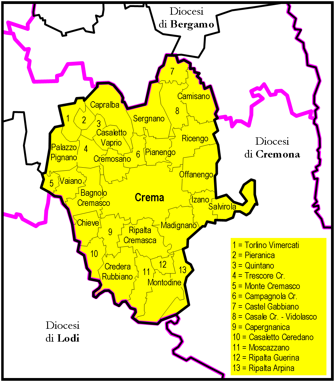 Mappa della Diocesi di Crema